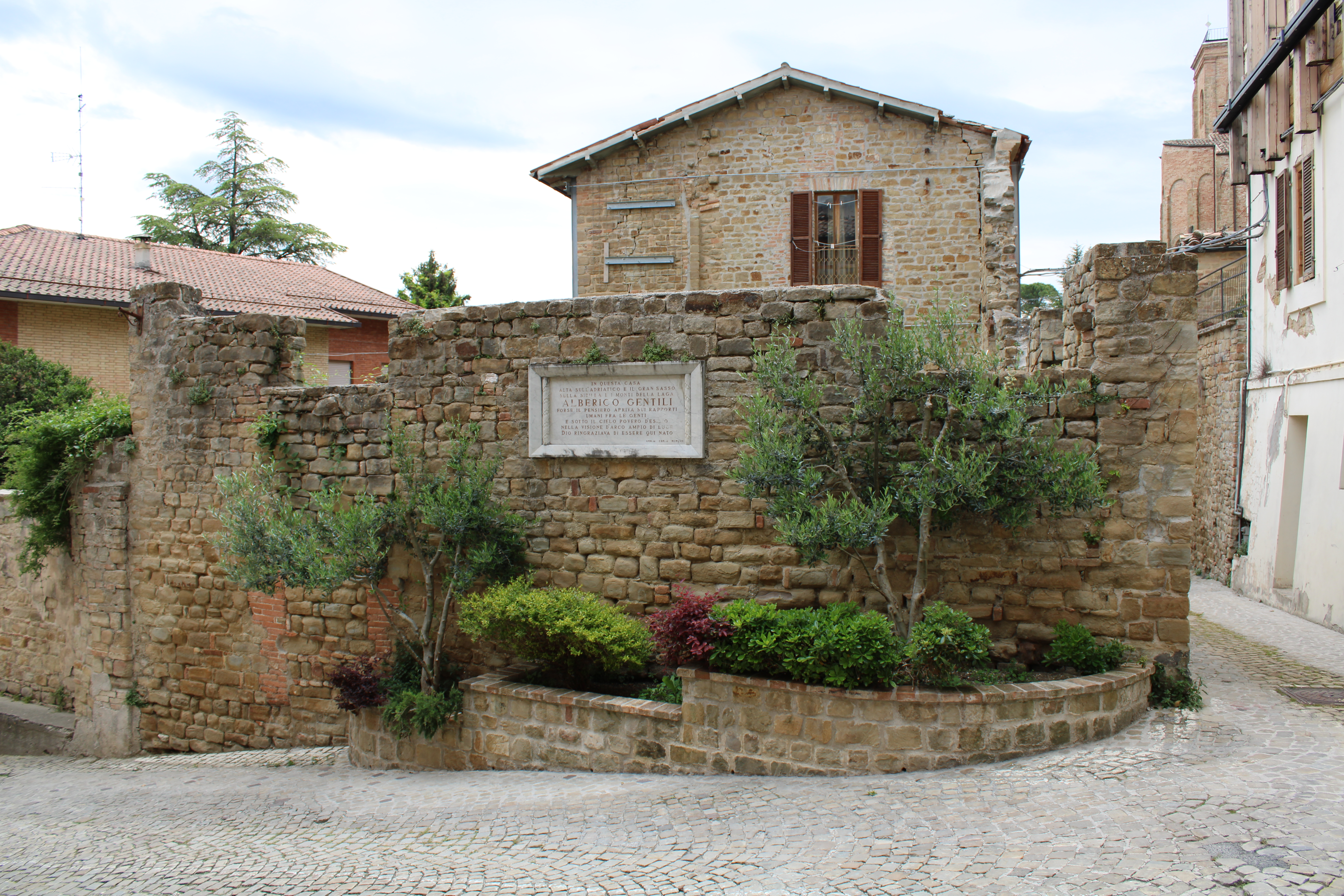 Ruderi della casa di Alberico, Scipione e Matteo Gentili